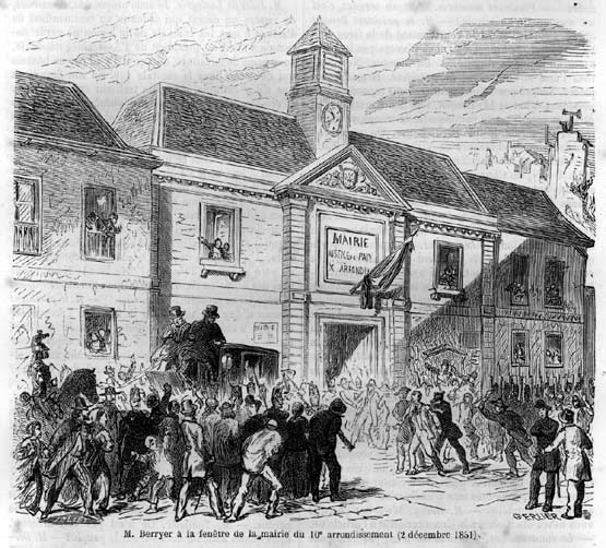 Pierre Antoine Berryer (1790-1868) à la fenêtre de la mairie du Xe arrondissement de Paris le 2 décembre 1851.